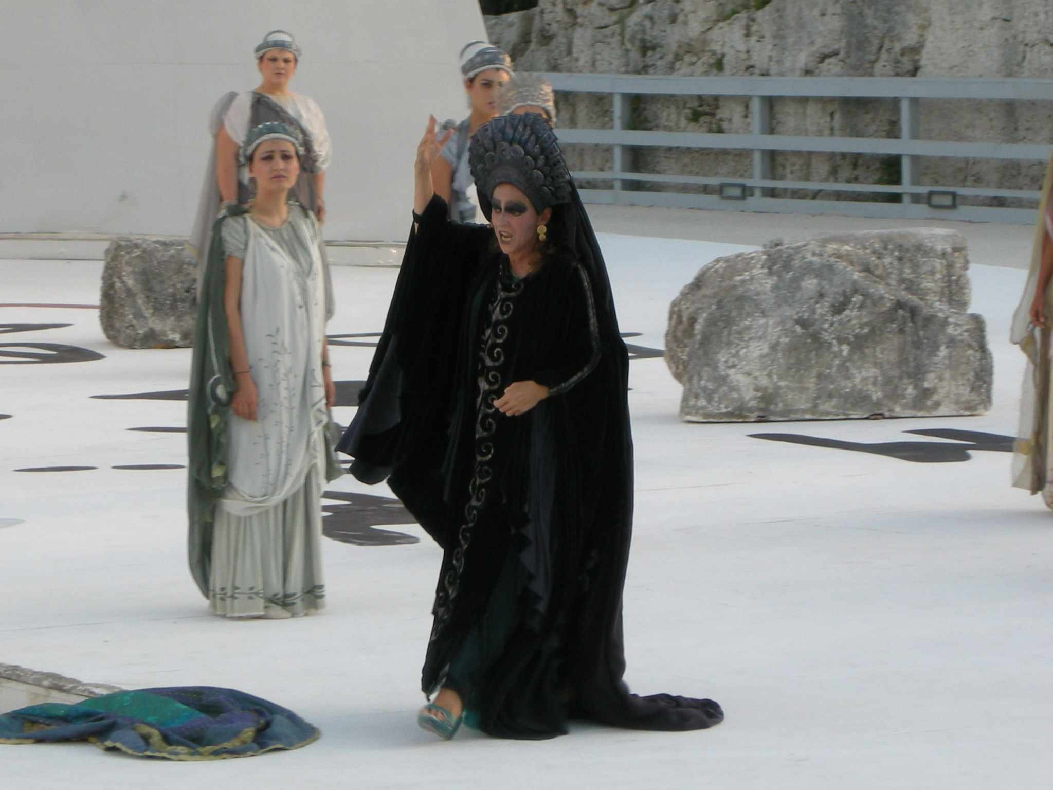 Elisabetta Pozzi as medea